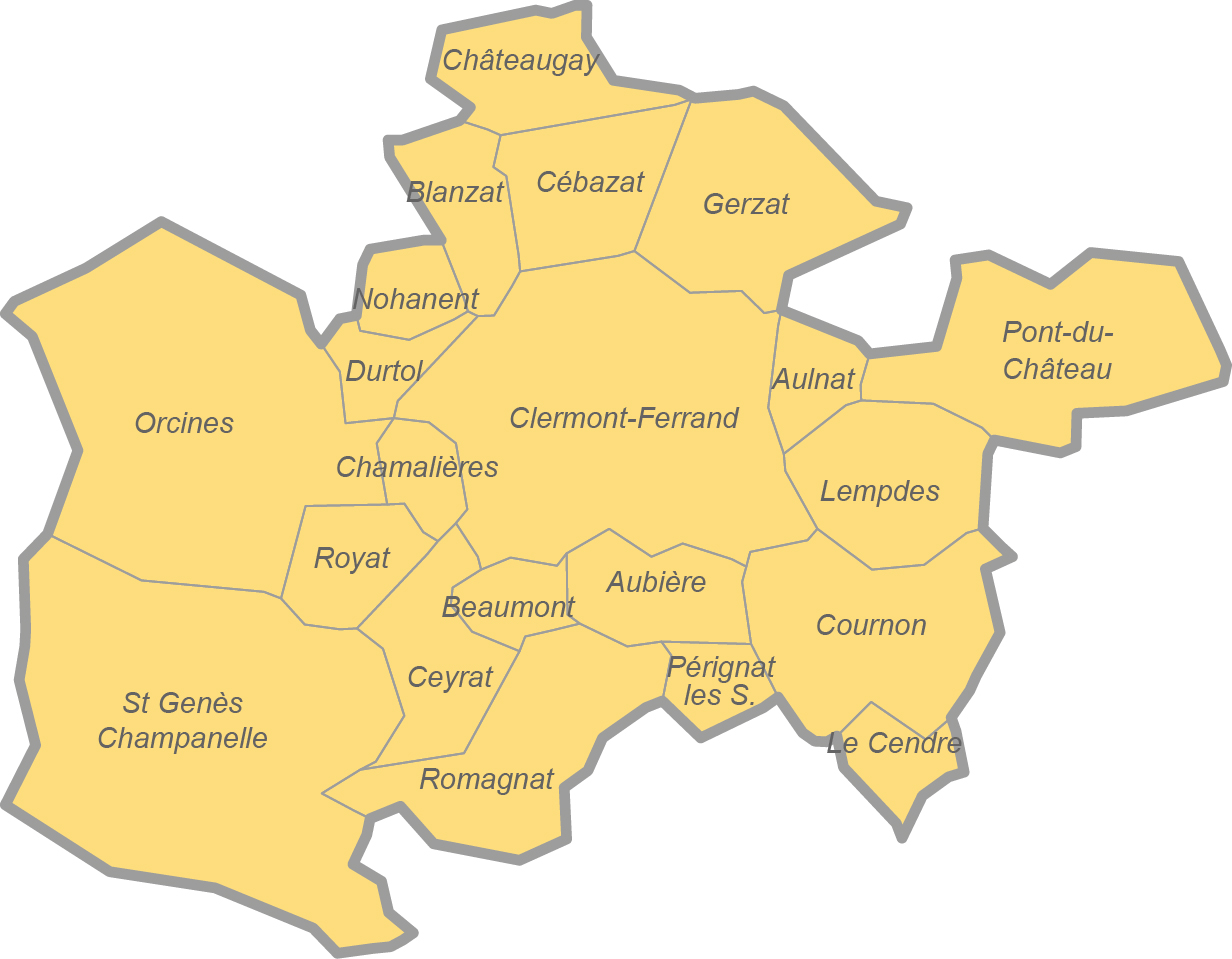 Carte des communes membres de l'intercommunalité française Clermont Auvergne Métropole au 1er janvier 2018